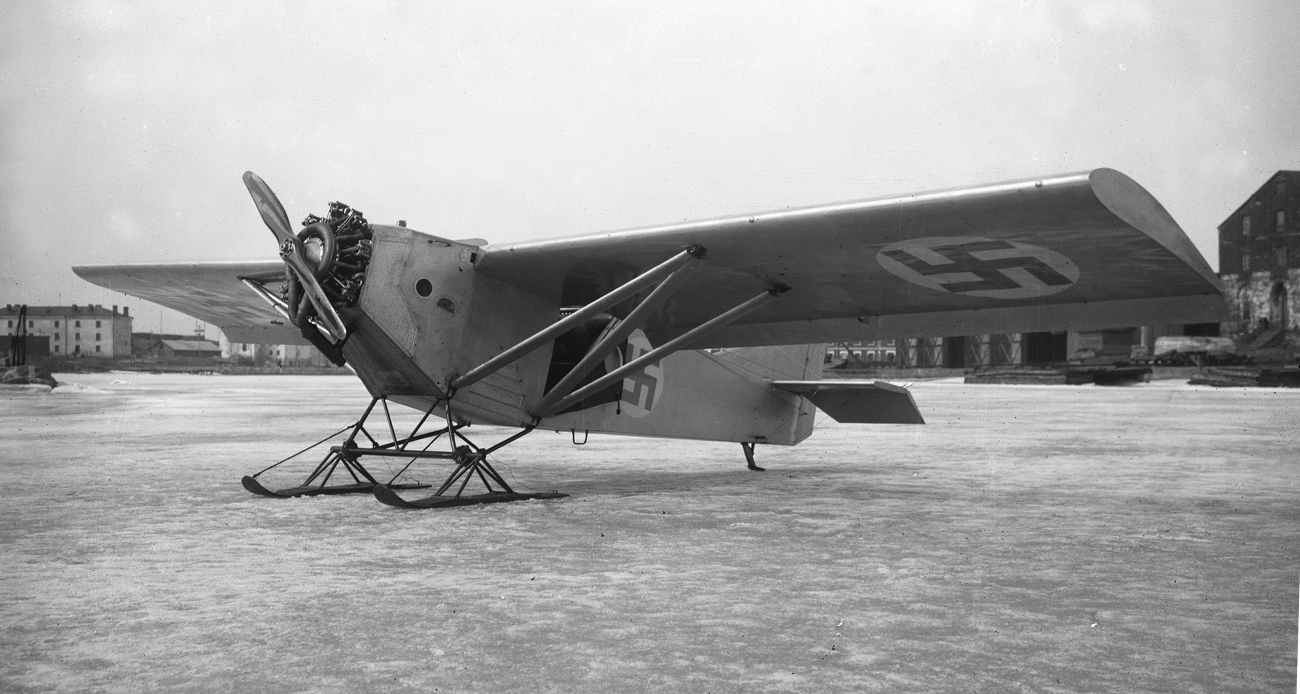 Ilmailuvoimien lentokonetehtaan siviili-ilmailun tarpeisiin suunnittelema I.V.L. K.1 Kurki Suomenlinnassa maaliskuussa 1927. Asser Järvisen ja ins. Bergerin konetta ei otettu tuotantoon lentokonetehtaalla.